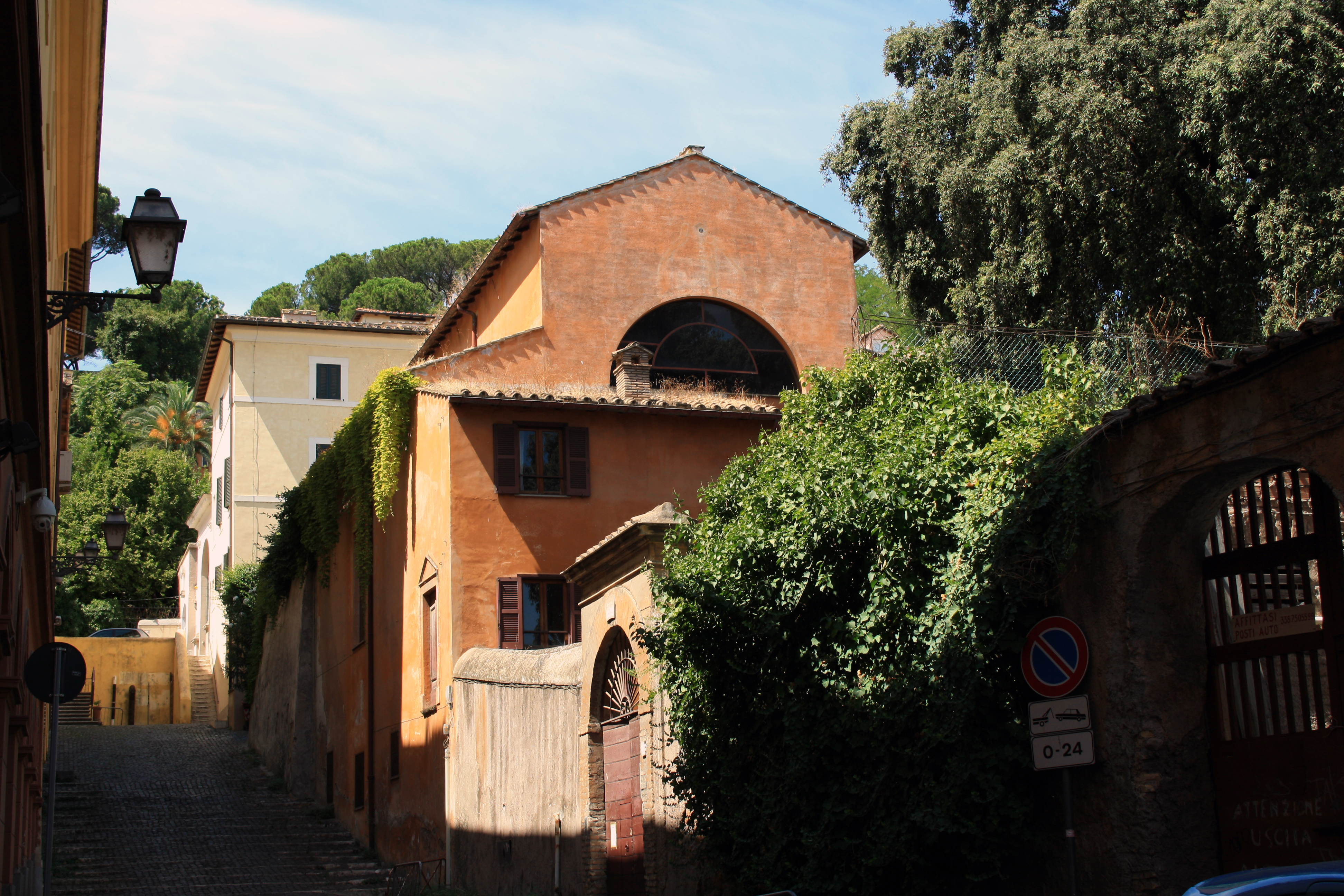 Chiesa annessa di Santa Maria Assunta al Gianicolo